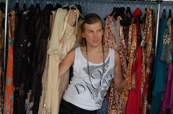 Christophe Guillarmé, styliste français.